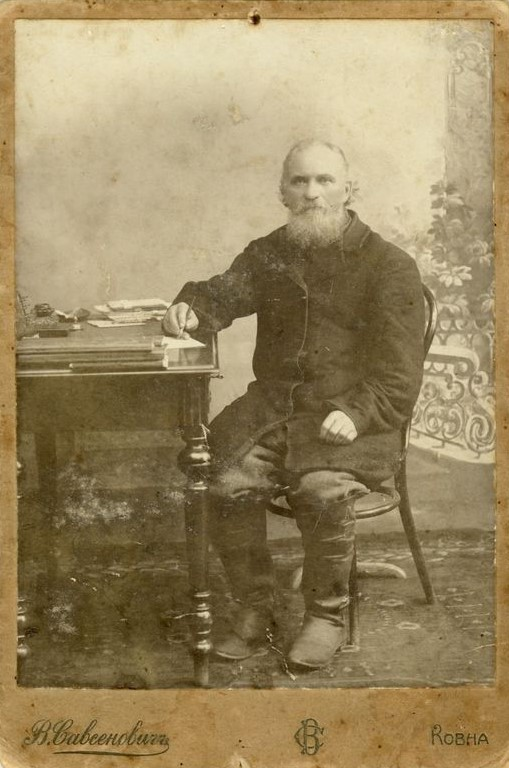 Jurgis Bielinis in Kaunas